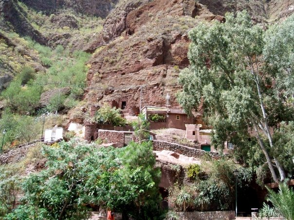 Cueva Bermeja, casa grotta